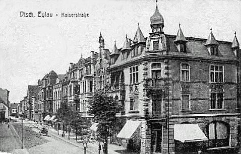 Iława ok. 1910 roku Deutsch Eylau um 1910 Quelle: Postkarte, gelaufen 1914 Lizenz: 10:38, 3. Feb 2006 Muggmag 478 x 306 (55504 Byte) (*Deutsch Eylau (Westpr.) um 1910 *Quelle: Postkarte, gelaufen 1914 *Lizenz: PD-old )